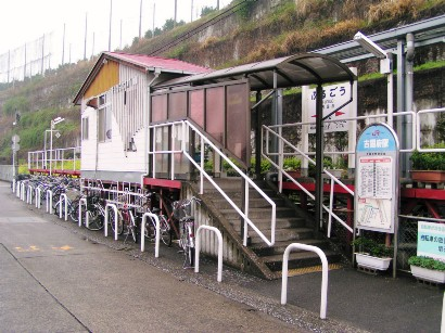 2005年3月28日に投稿者が古国府駅にて撮影。